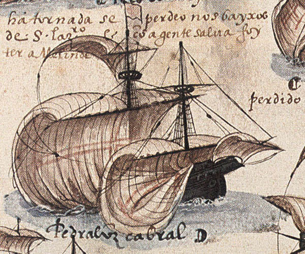 Memória das Armadas que de Portugal passaram à Índia..., pormenor da nau de Pedro Álvares Cabral